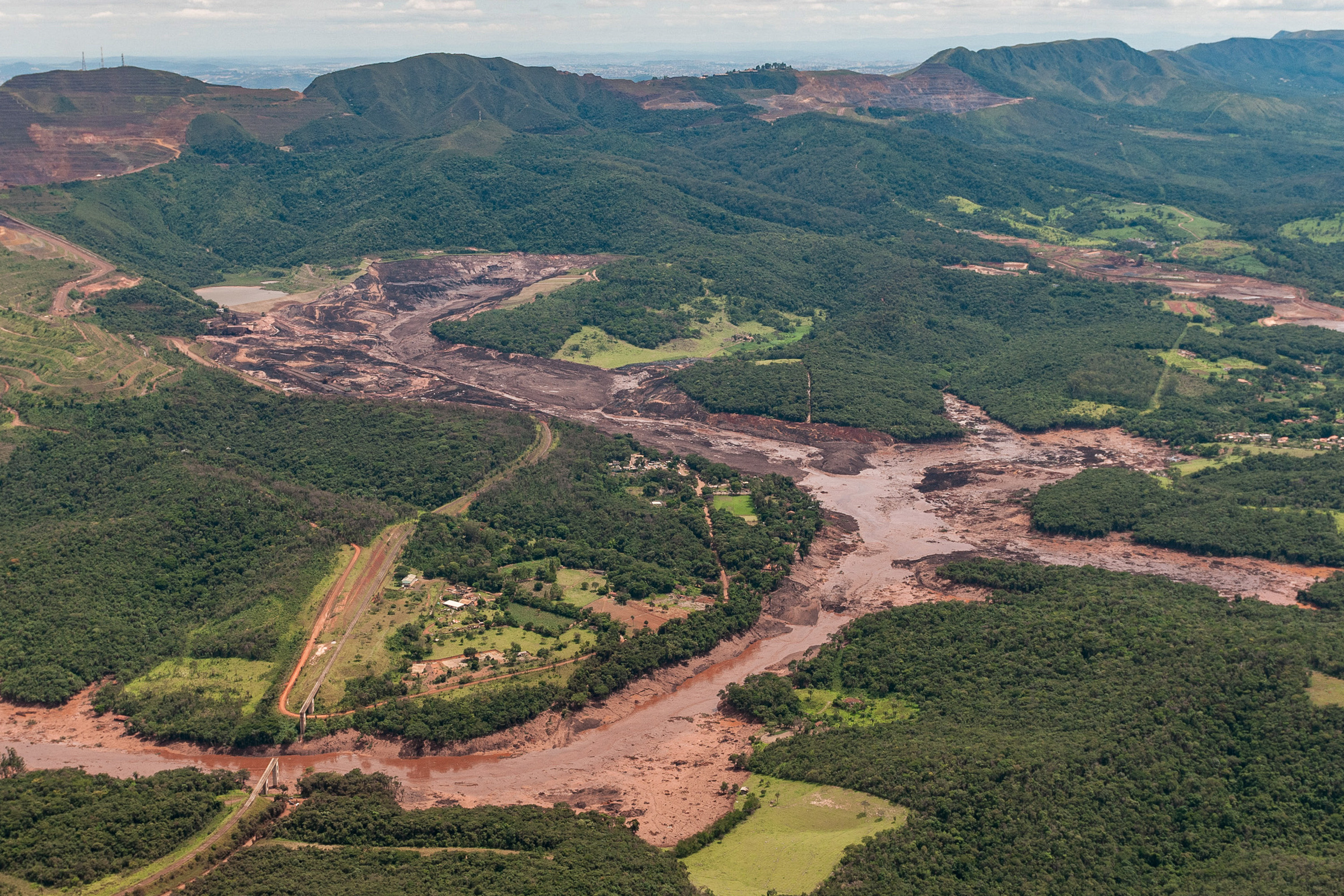 Catástrofe socioambiental provocada pelo rompimento de barragem da mineradora Vale em Brumadinho (MG) Foto: Vinícius Mendonça/Ibama Mais informações: Rompimento de barragem da Vale em Brumadinho (MG) destruiu 269,84 hectares Ibama multa Vale em R$ 250 milhões por catástrofe em Brumadinho (MG)